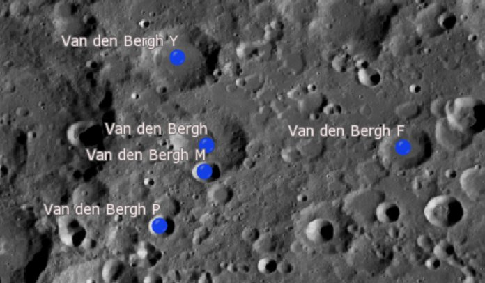 Cráter lunar Van den Bergh. Cráteres satélite. (Imagen LRO)